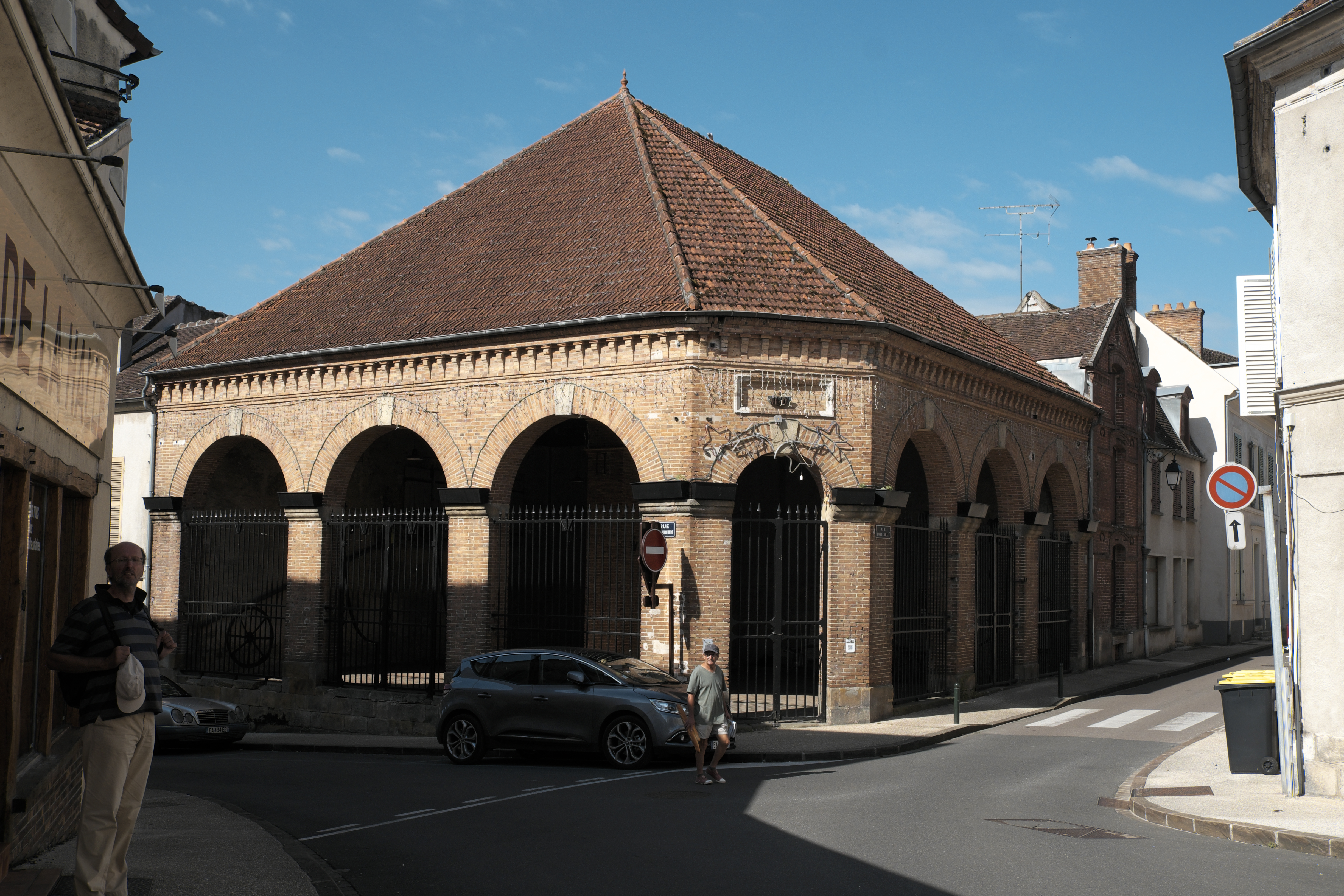 Markthalle in Donnemarie-Dontilly im Département Seine-et-Marne (Île-de-France/Frankreich)